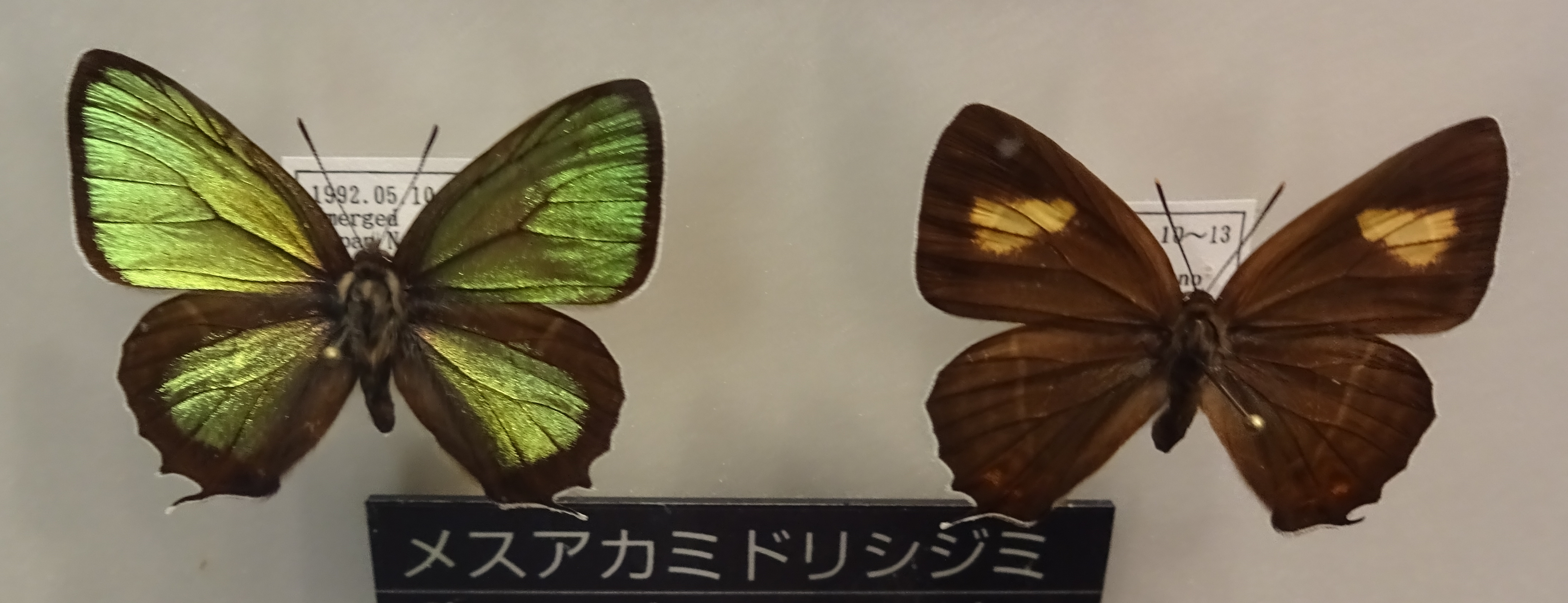 メスアカミドリシジミ-上野